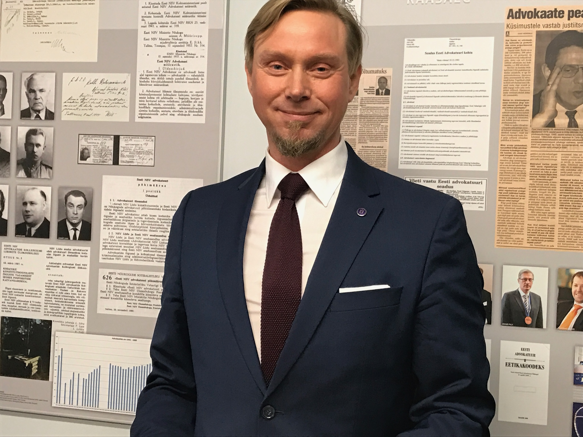 Sten Luiga 2017. aastal Eesti Advokatuuri teenetemedali üleandmisel